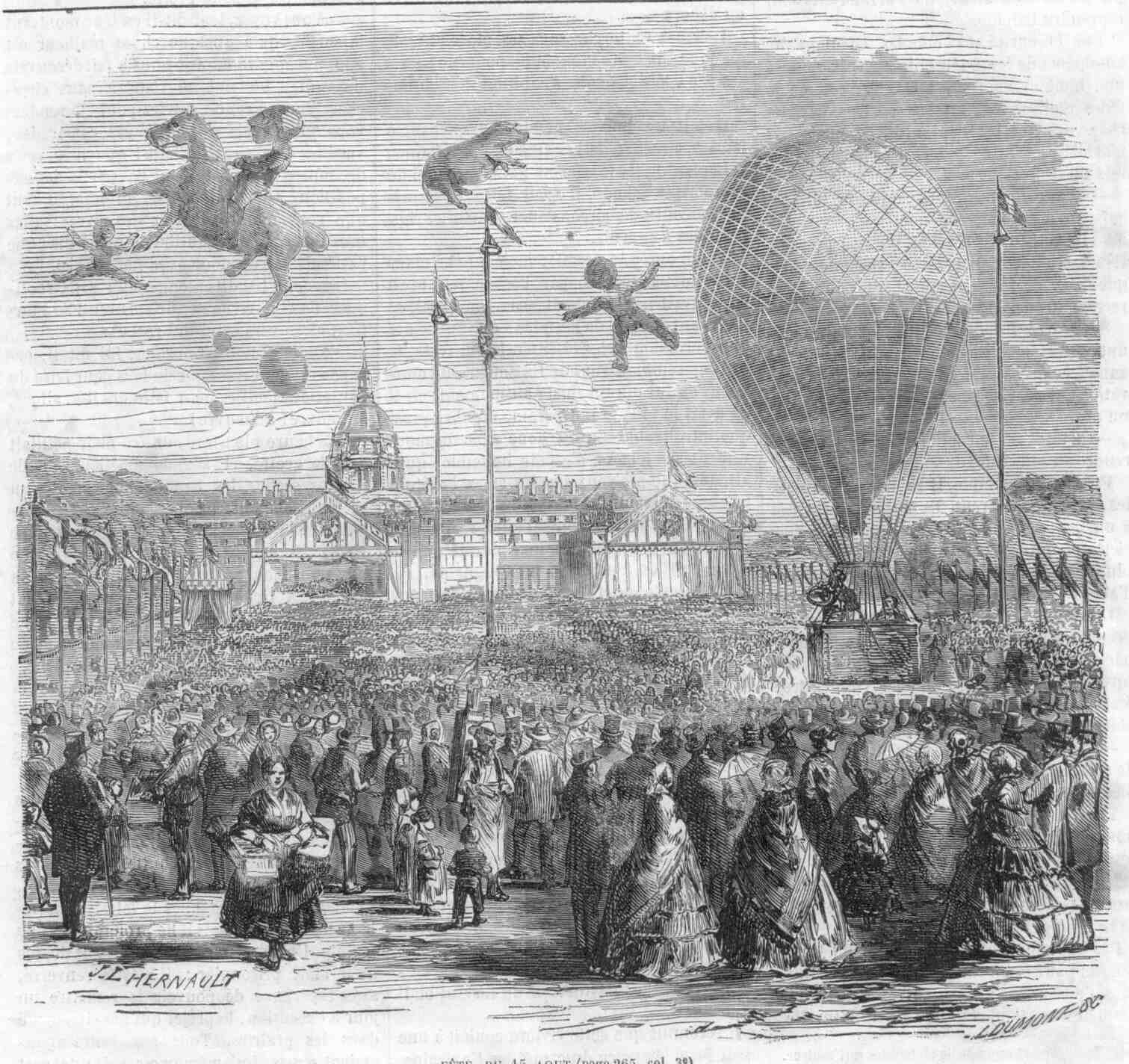 Vue de l'esplanade des Invalides, à Paris, le jour de la Fête Nationale française du 15 août 1858, paru dans le journal Le voleur. On distingue dans la foule, au premier plan, un marchand de coco